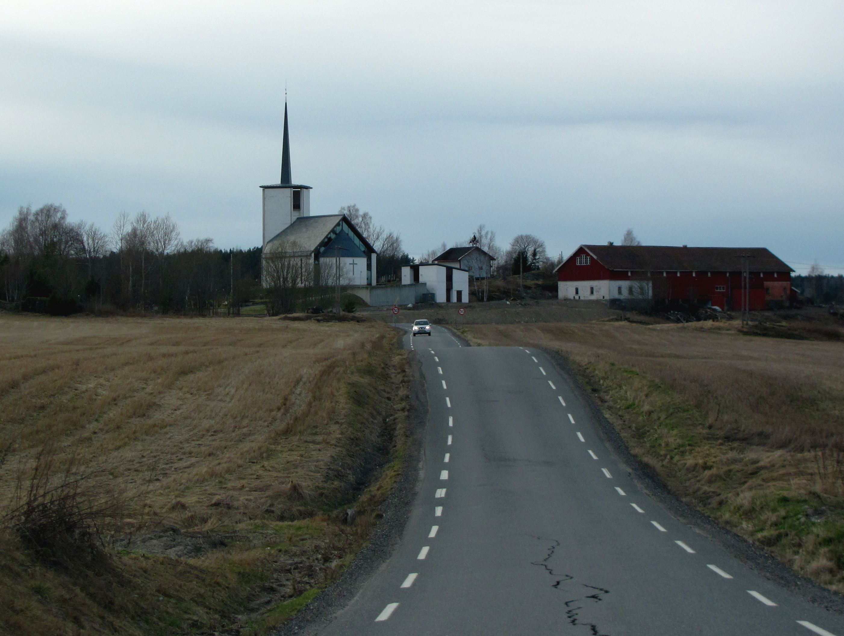 Såner kirke bygd 1995 i Vestby kommune, Akershus. Vålerveien (FV6) i forgrunnen.